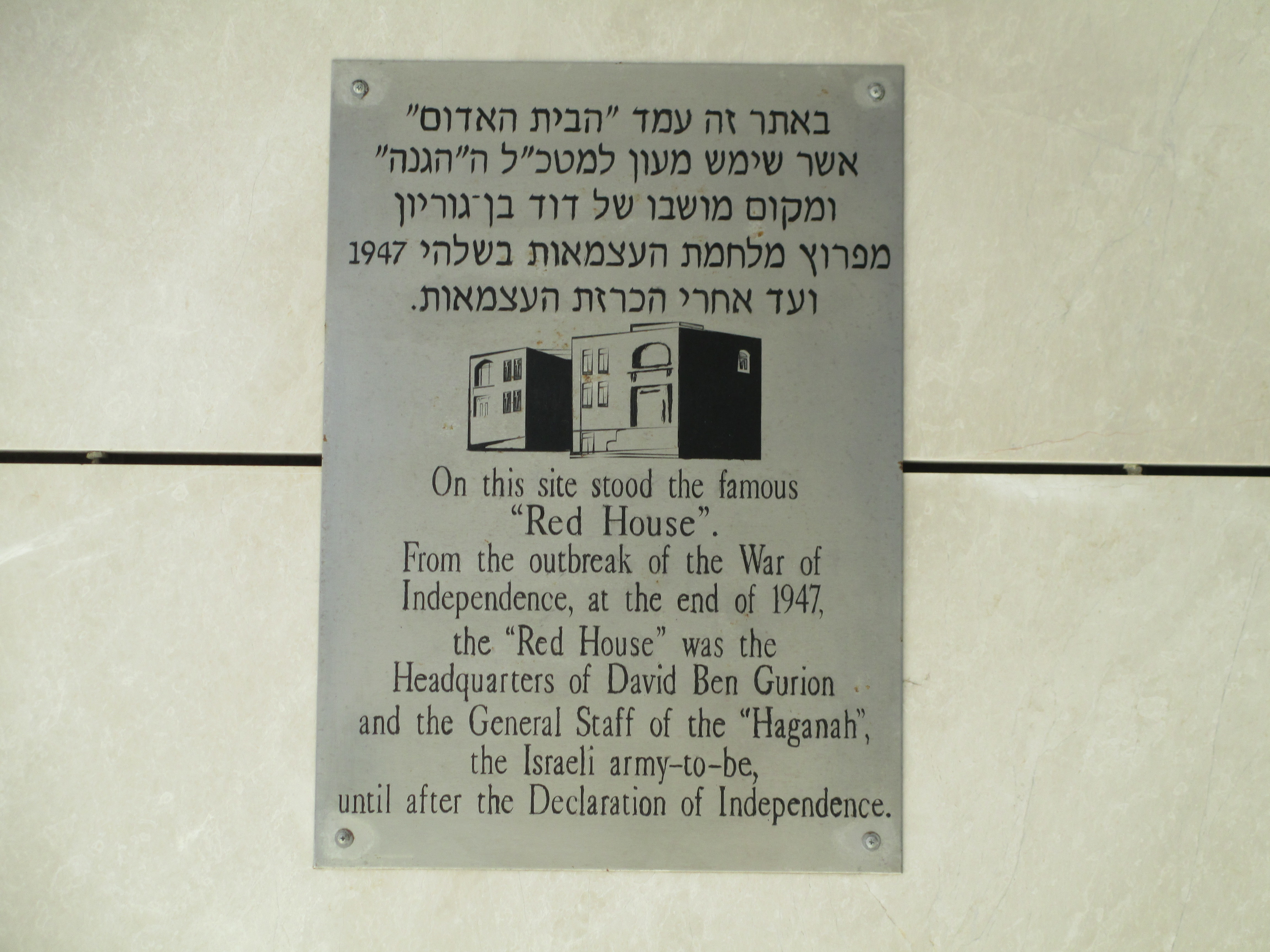 לוחית זיכרון ל"בית האדום" בכניסה למלון שרתון ברחוב הירקון בתל אביב